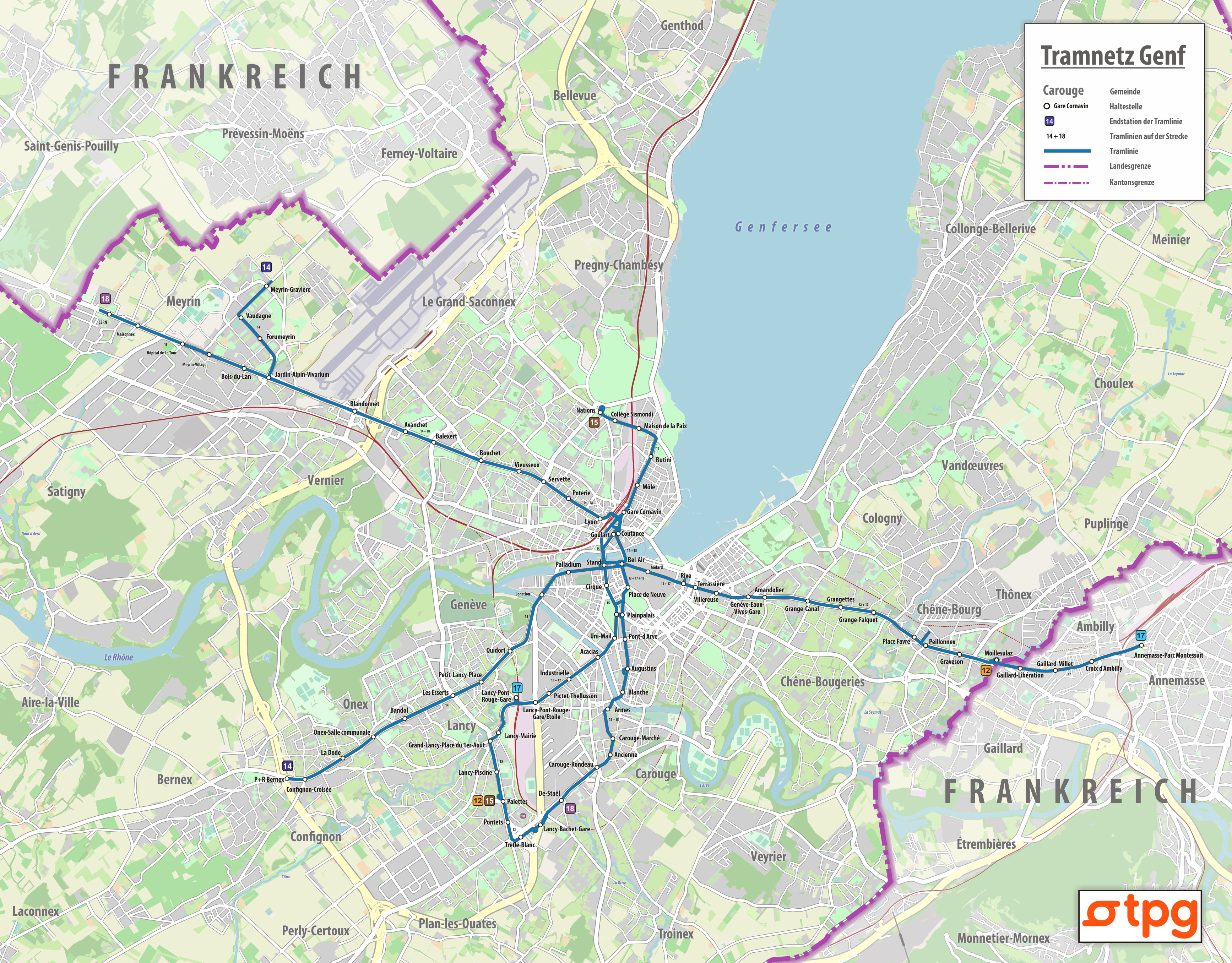 Tramnetzplan des Kantons Genf und Umgebung, ab 15. Dezember 2019